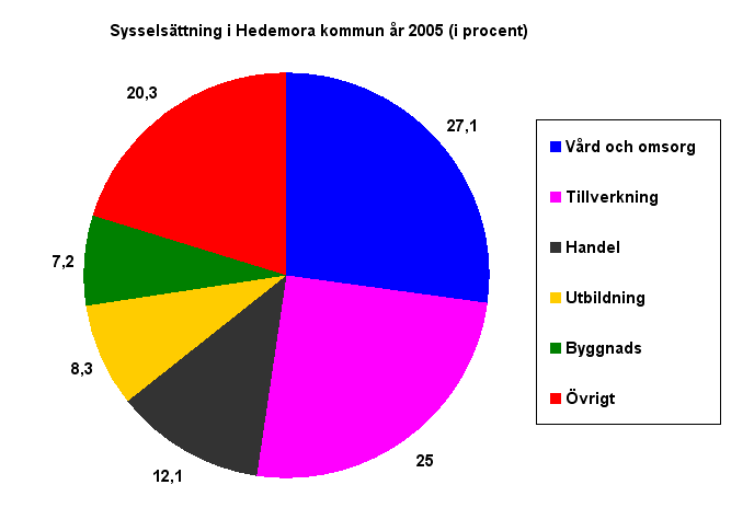 Diagram över sysselsättningen i Hedemora Kommun. Employment in Hedemora municipality (Sweden)